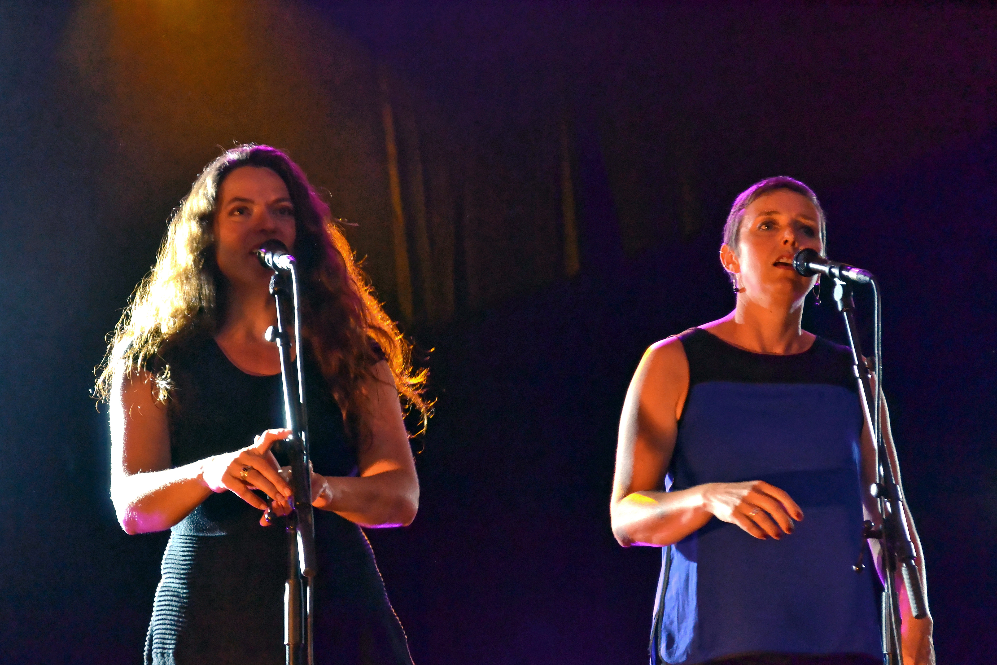 Tan De'i en fest-noz à l'espace Saint-Corentin lors du festival de Cornouaille le 25 juillet 2014.